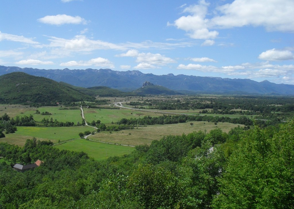 Поглед на Горњу Плочу са плочанског Кланца, Лика